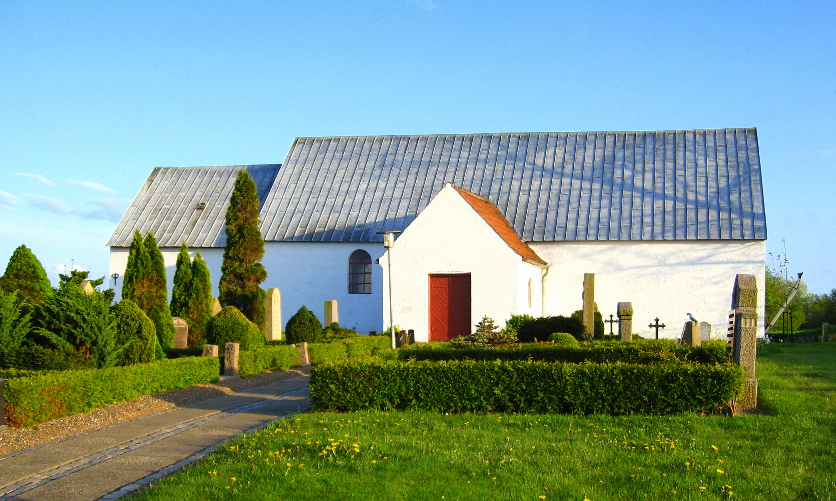 Hæstrup Kirke, Hjørring Kommune